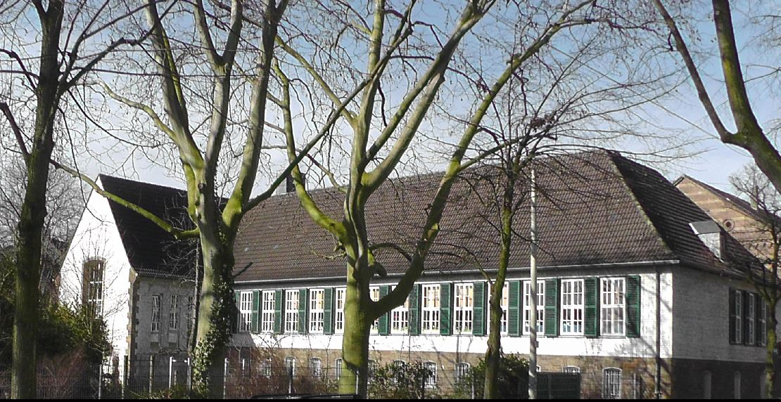 Hilden Schulstraße 44, Haus der Jugend, heute KITAThis is a photograph of an architectural monument.